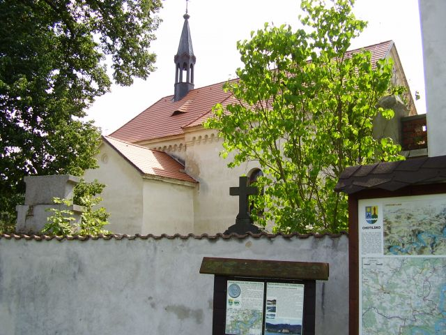 Stará Živohošť - kostel Svatého Šebestiána